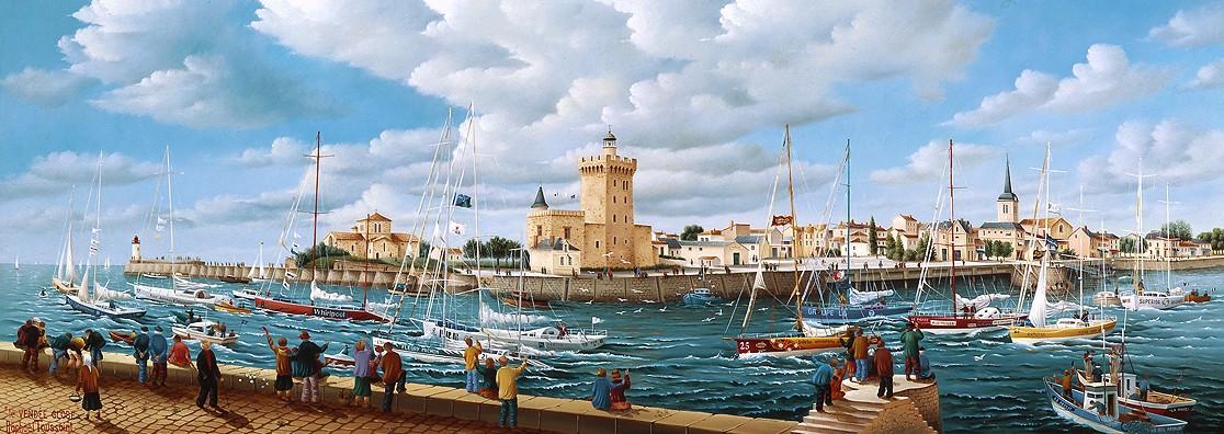 Hommage au Vendée Globe par le peintre français Raphaël Toussaint. H.S.B. 35x95 et datée 1999.